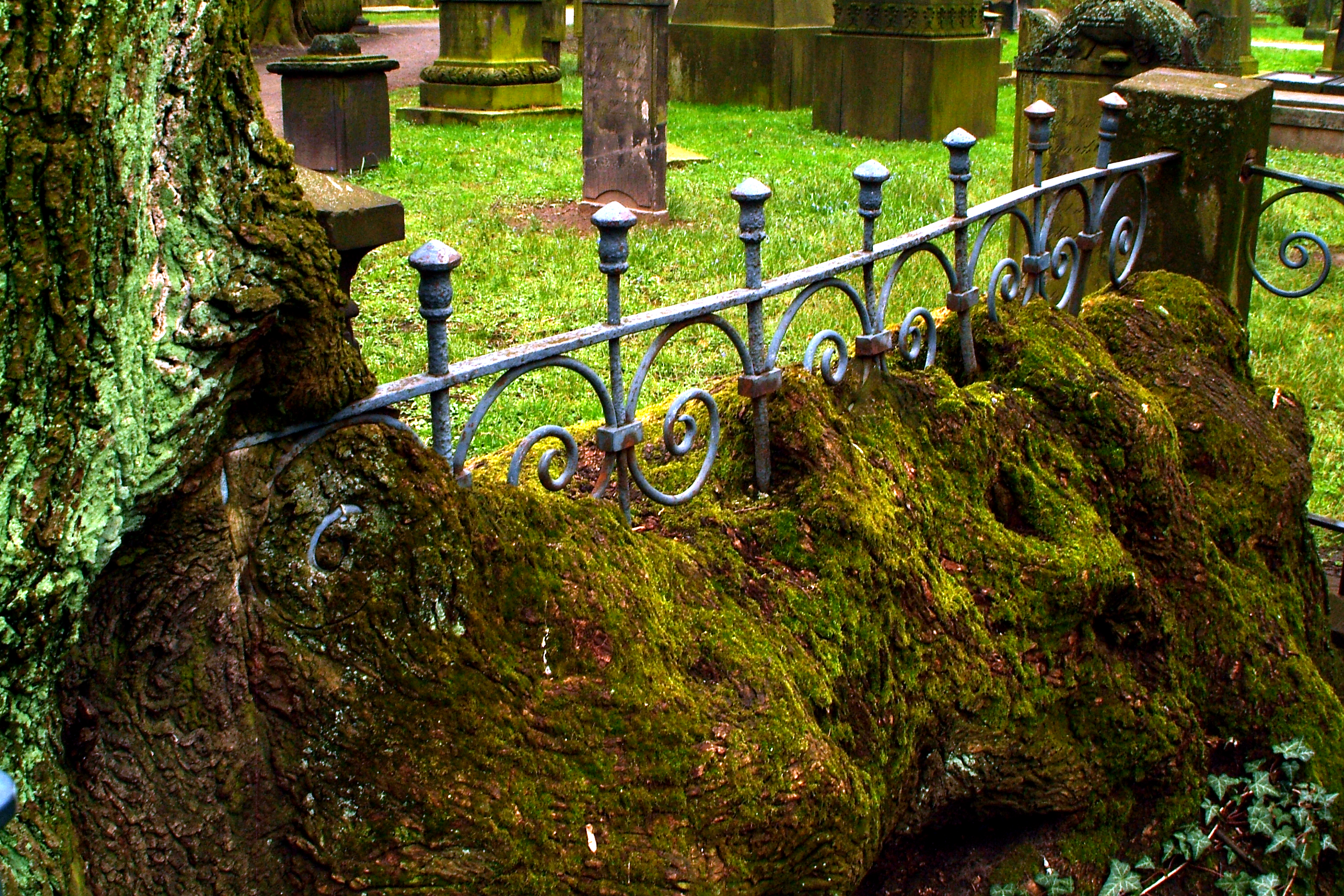 Der anfangs horizontal gewachsene Ahornbaum, der die Einfriedung des Grabmales von Heinrich Bernhard Röhrs dann teilweise vollständig in seinen Stamm integriert hat; hier in einer Ansicht vom Fußende des Grabes mit Details des Zaunes